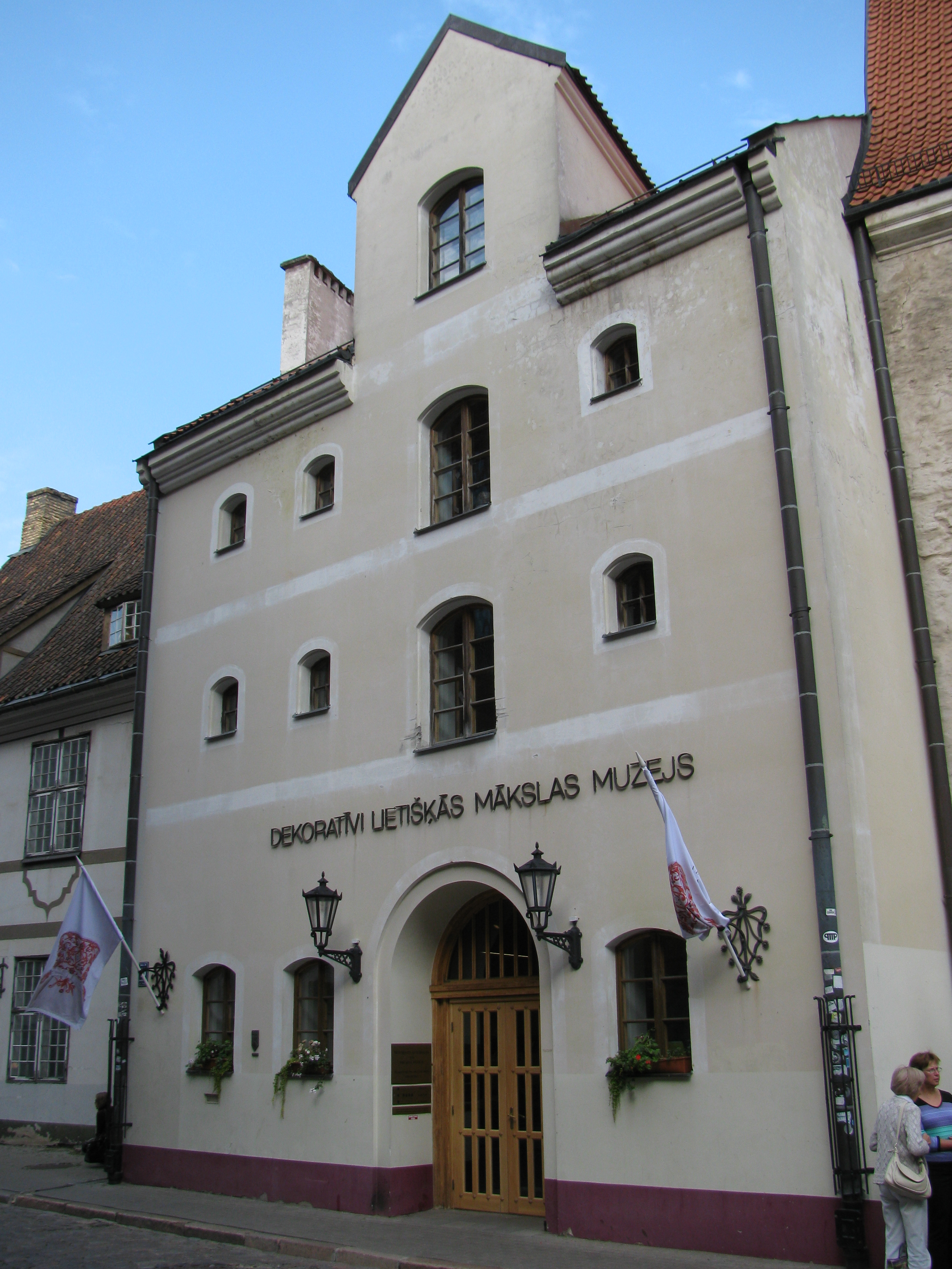 Pirmās Rīgas Ordeņa pils dienvidu korpuss - kapella, vēlāk - Sv. Jura katoļu baznīca, tagad - muzejs, Rīga, Skārņu iela 10/20; Kalēju iela 9/11